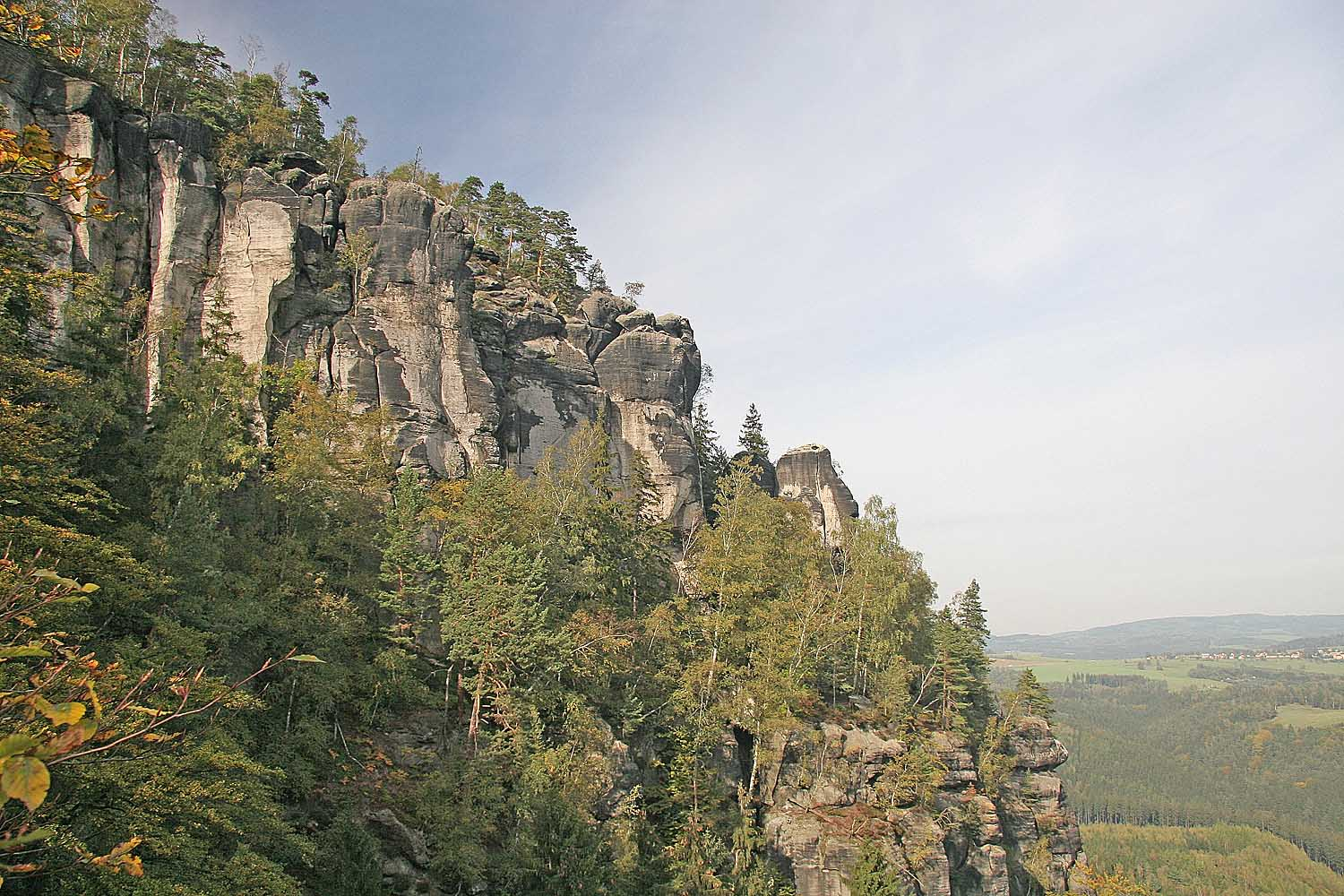 Affensteine in Saxony Switzerland autor: Prazak date: 11. 10. 2006